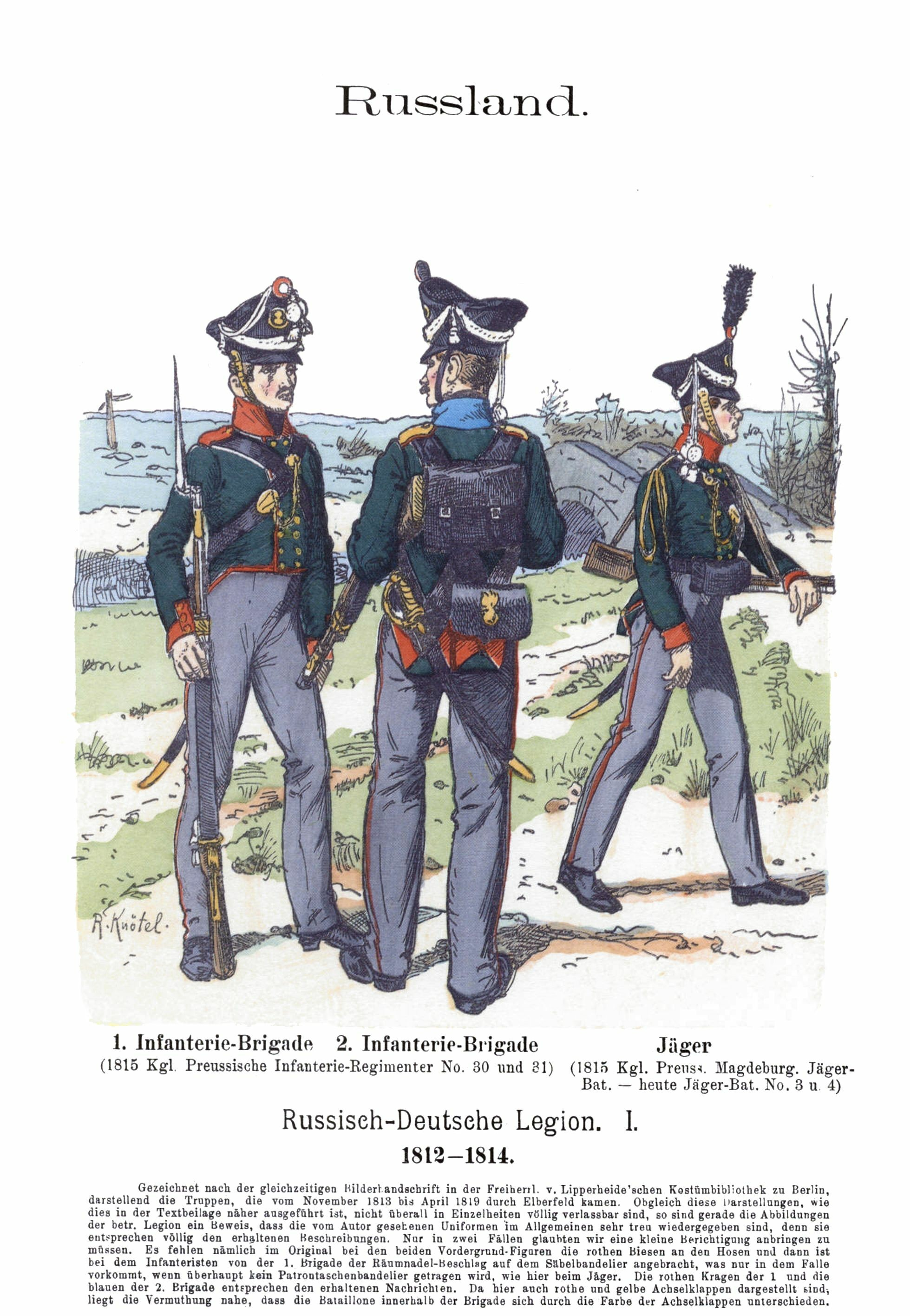 Русско-немецкий легион 1812-1814 - 1. Пехотная бригада - 2. Пехотная бригада - Егерь.